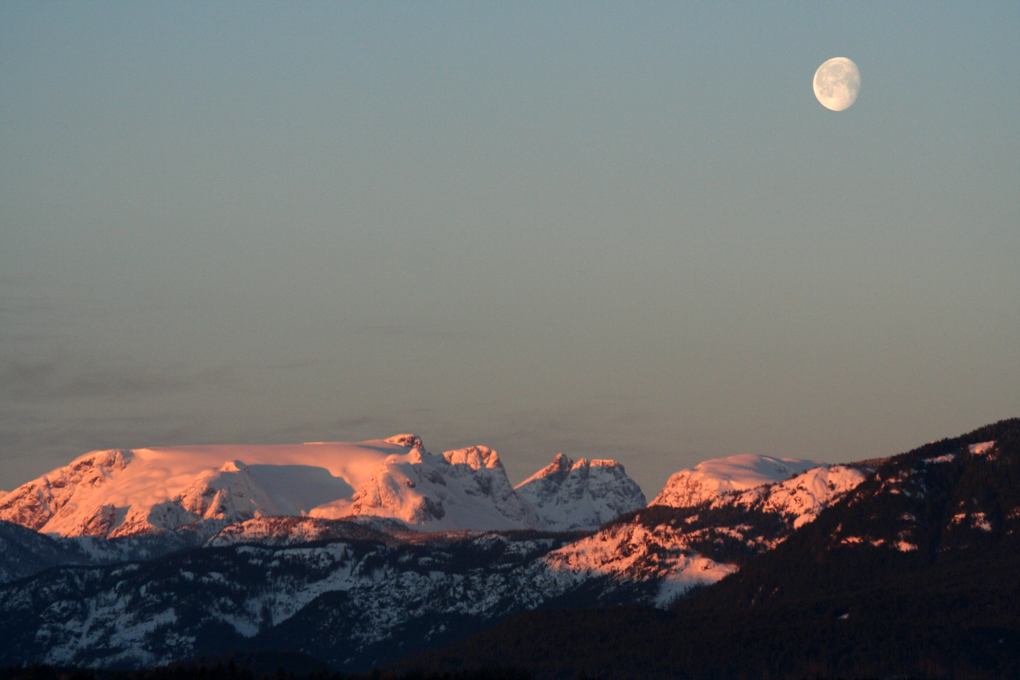 Comox Glacier